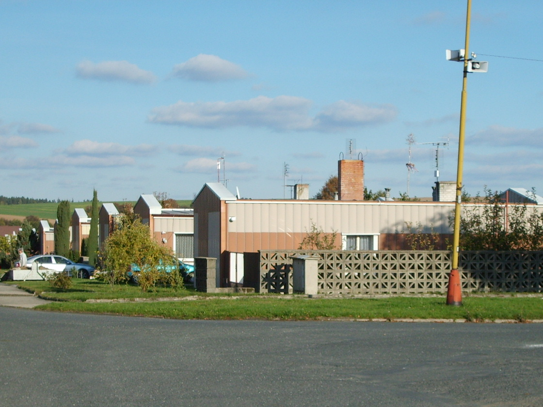 Split-level houses in Dolní Kralovice.